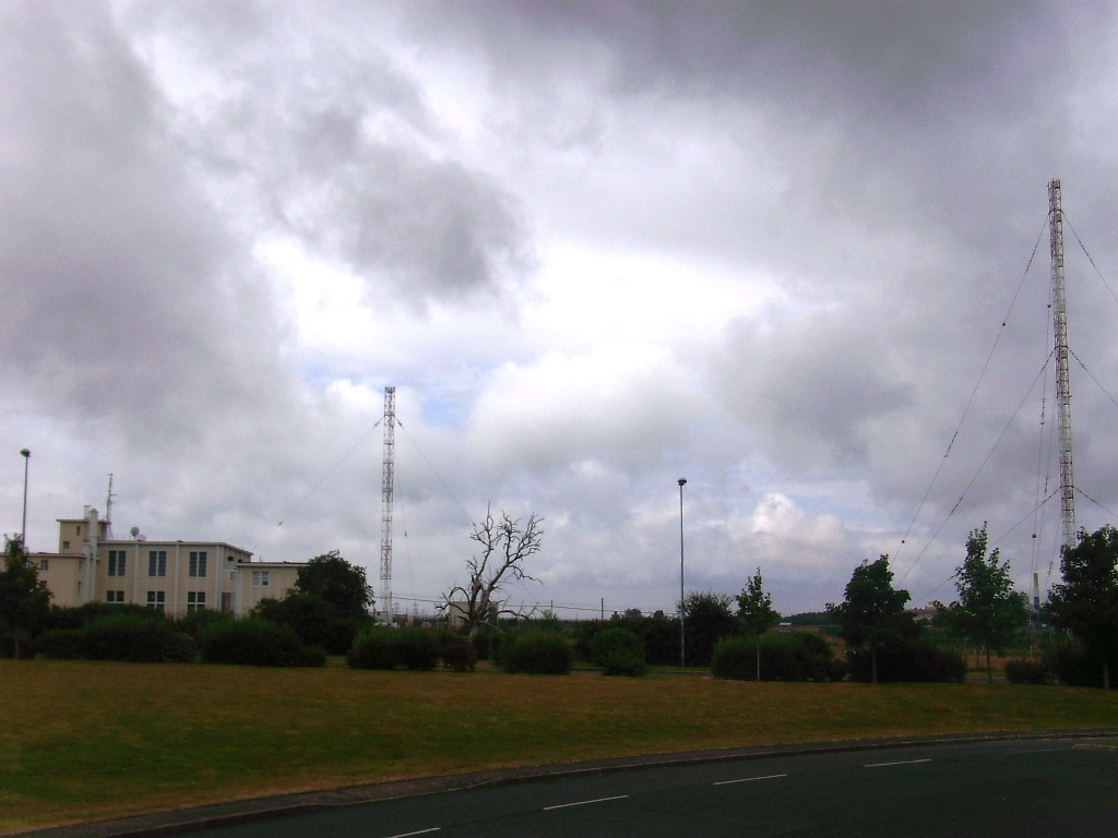 Vue globale de la station de radio-émission de Villebon-sur-Yvette (91)